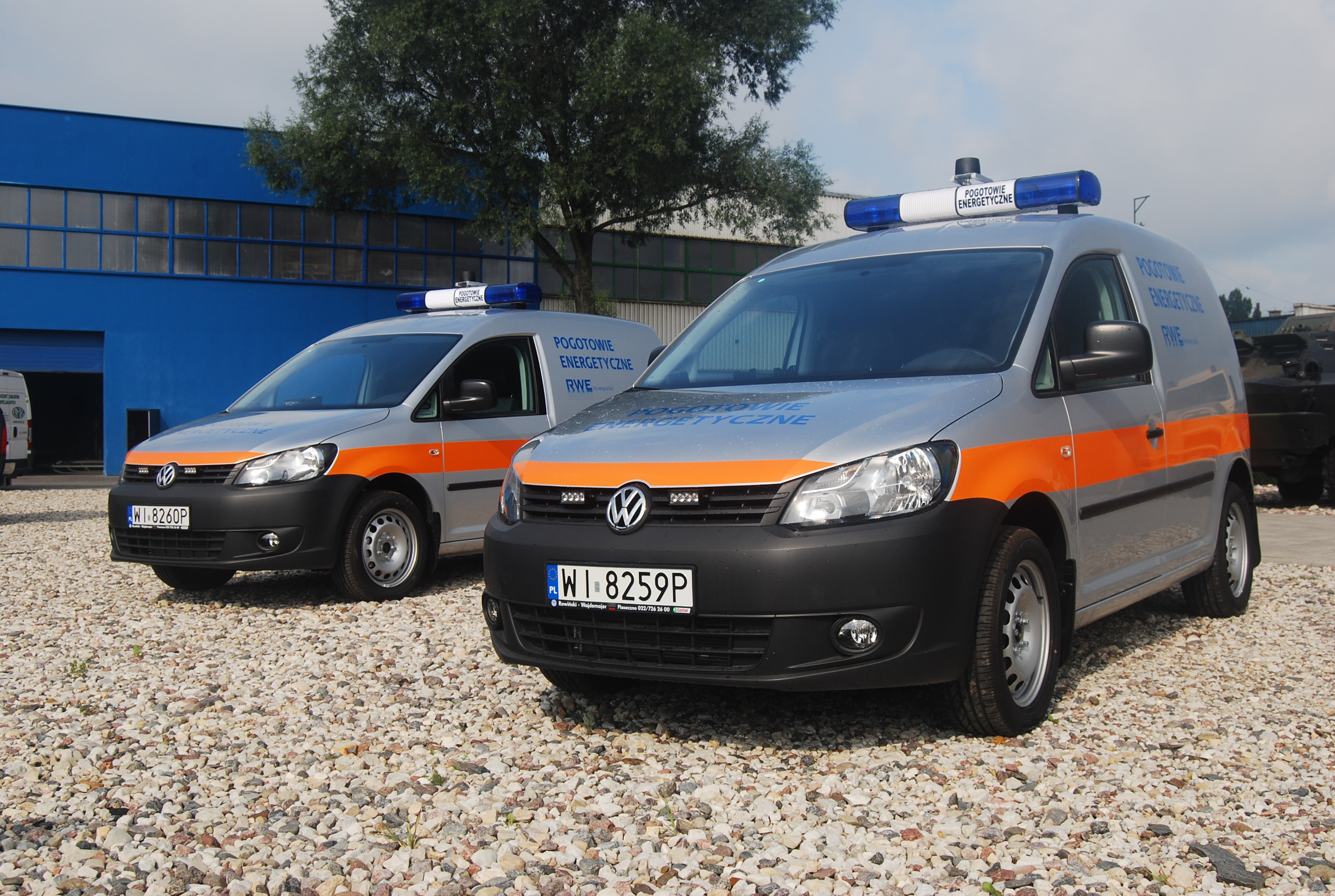 Pogotowie energetyczne (RWE) na bazie Volkswagena Caddy przygotowane przez AMZ Kutno